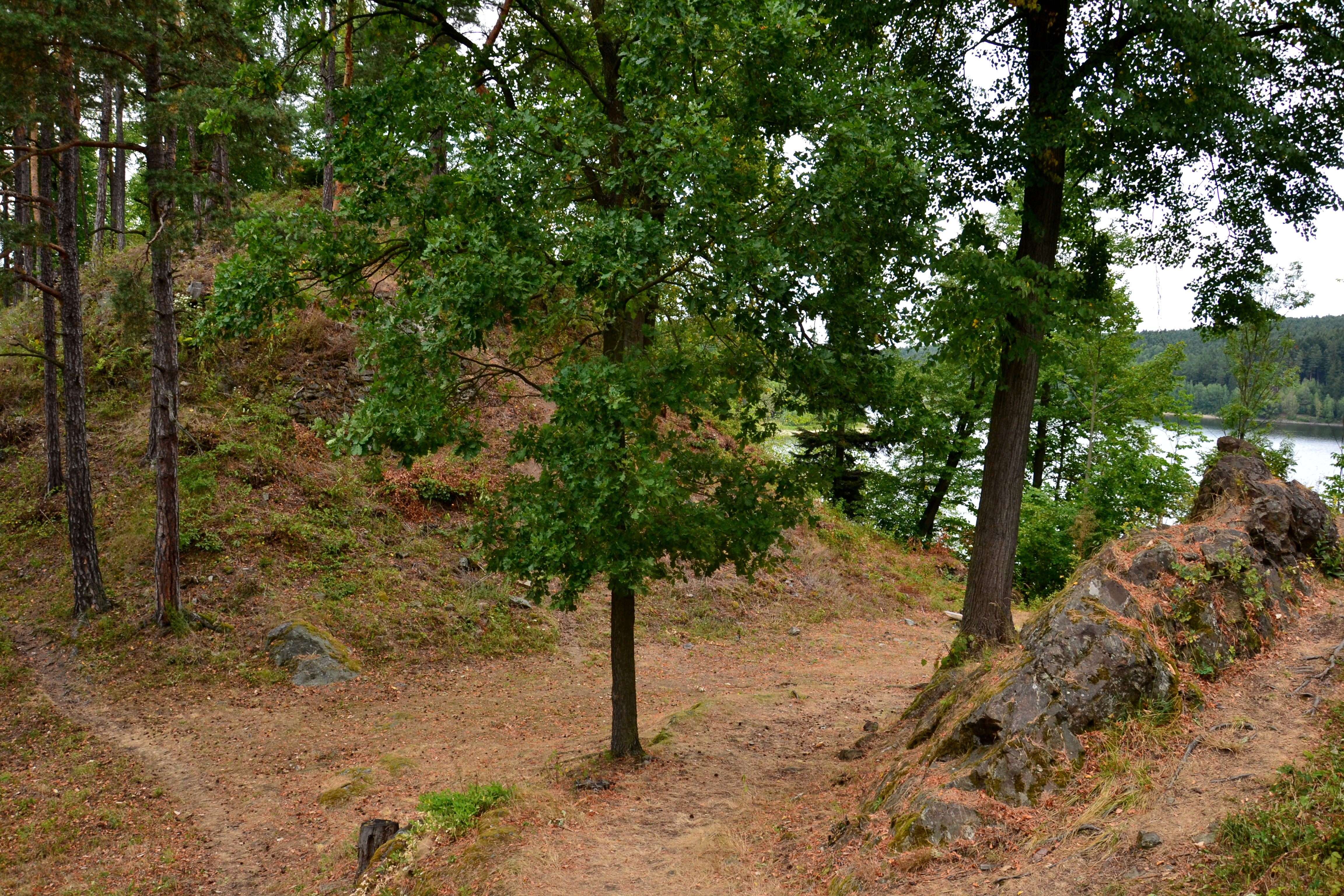 Příkop pod hradním jádrem